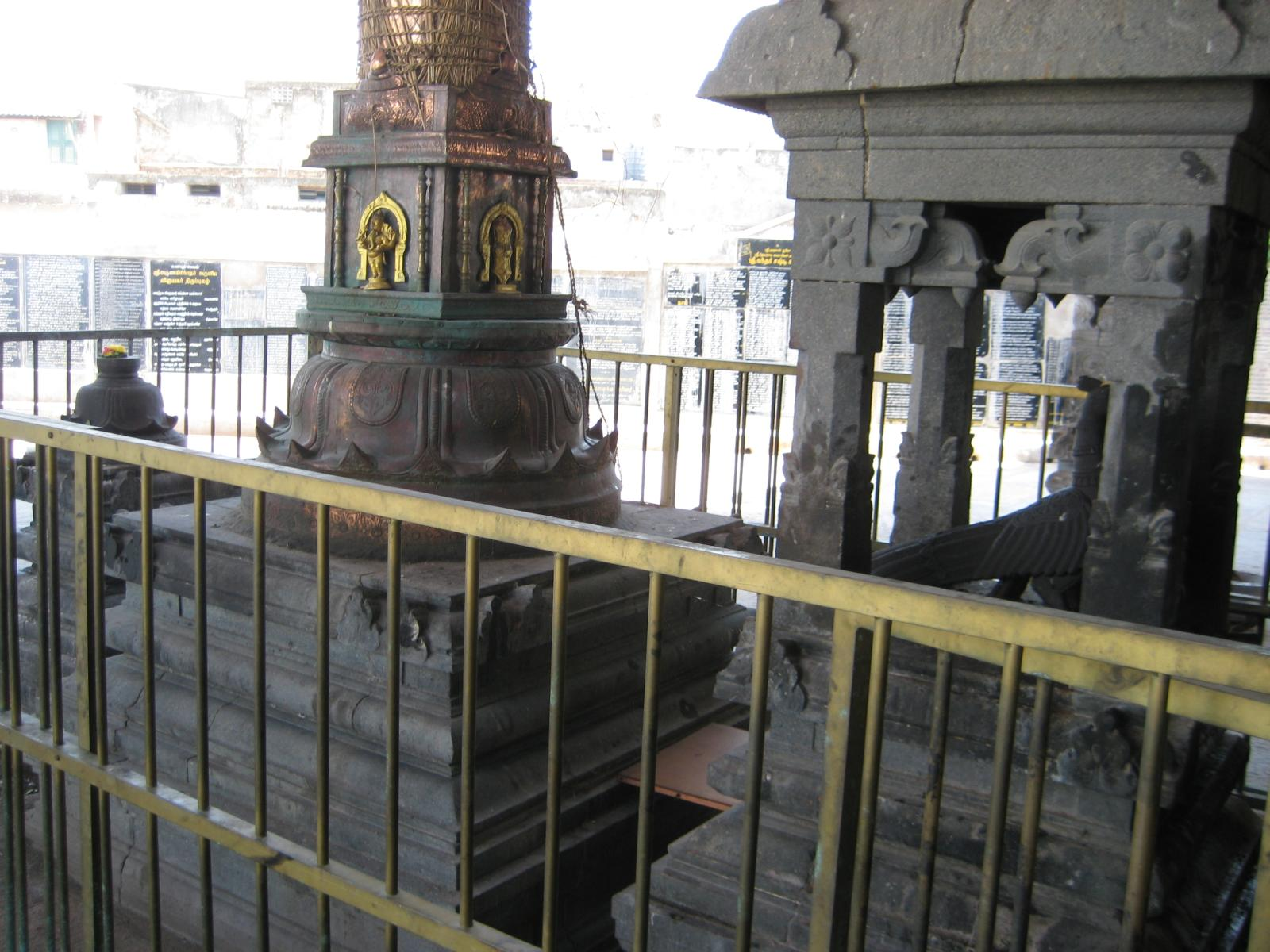 Dwajasthamba at entrance to Kumarakottam Temple